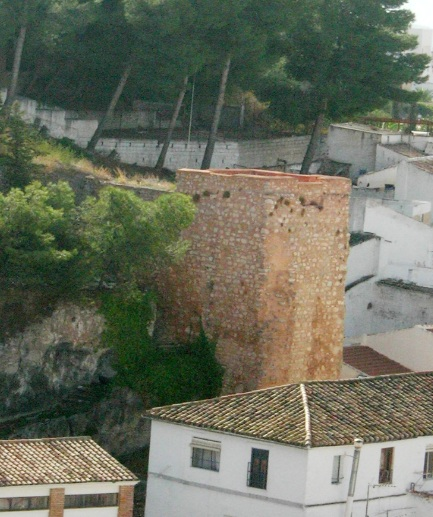 Torre Albarrana del Castillo de la Villa de Martos (Jaén)